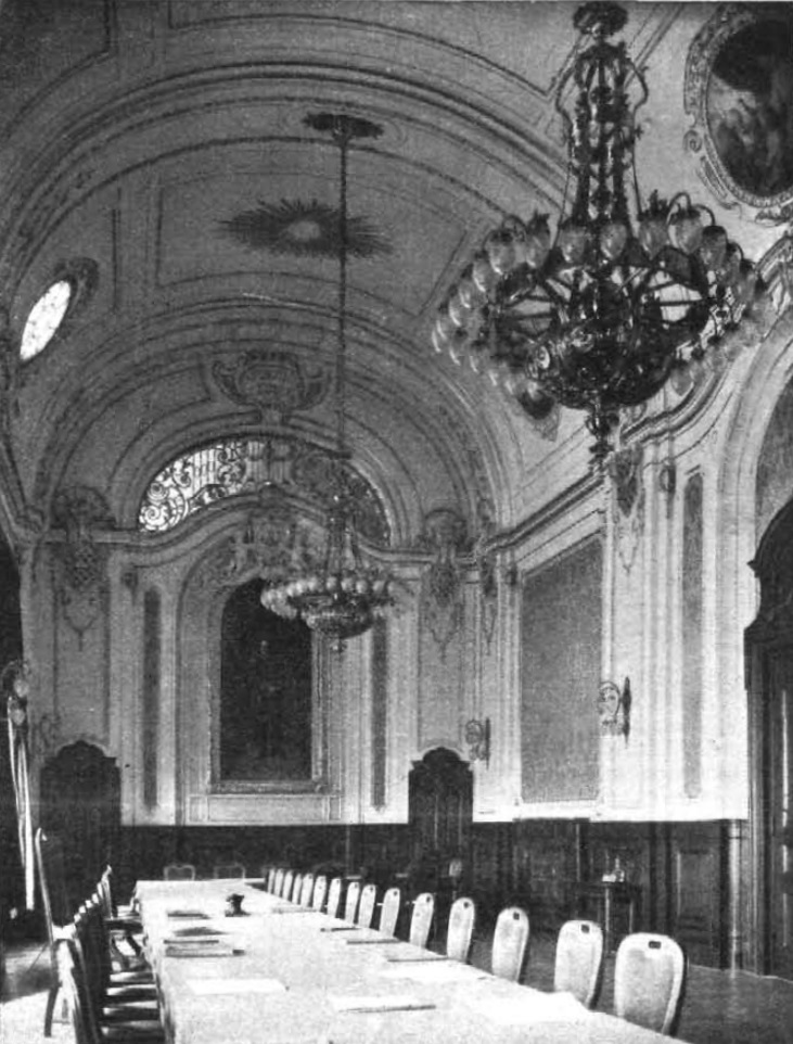 Regierungsgebäude Frankfurt (Oder) 1906 Hauptsitzungssaal